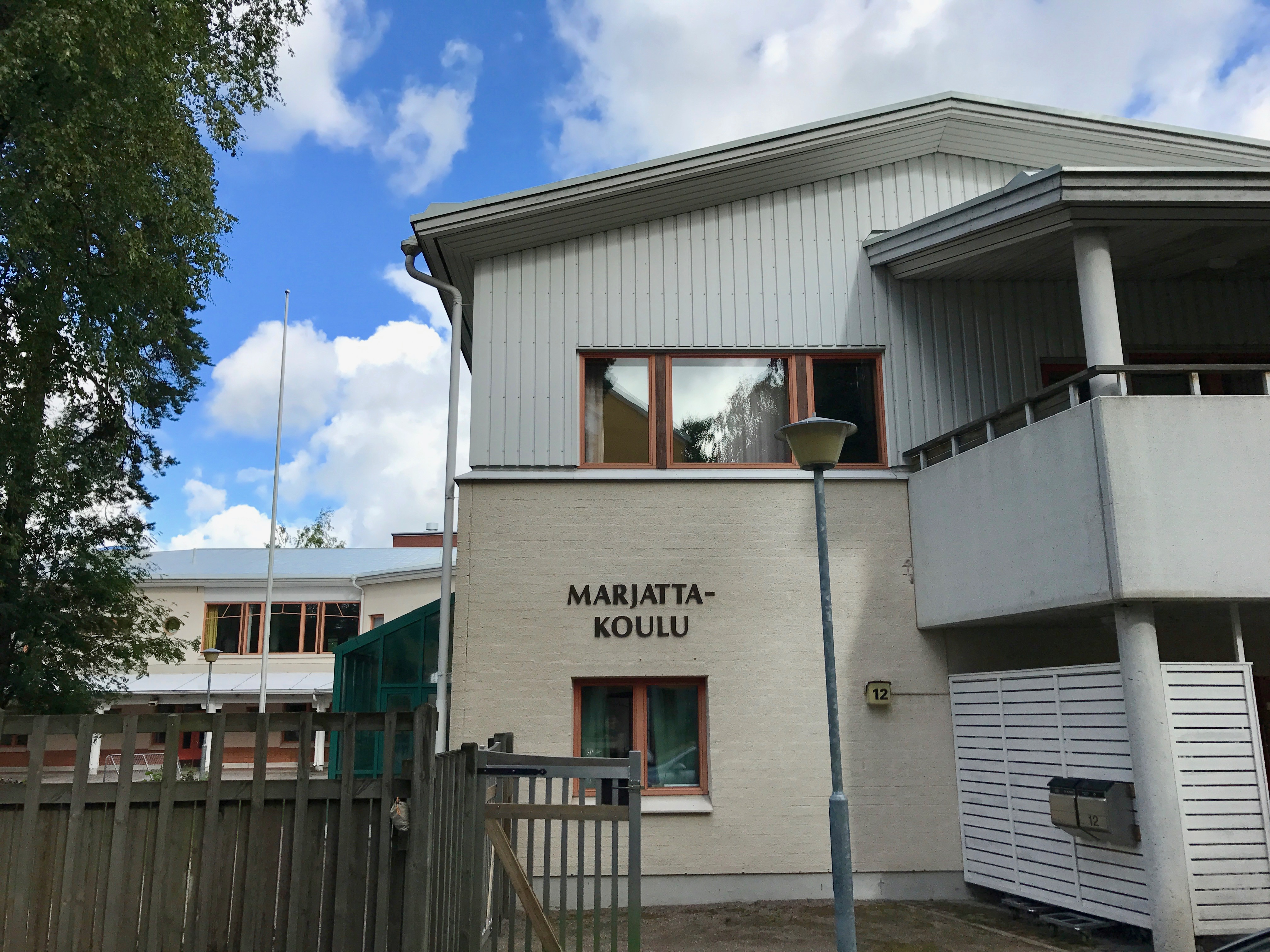 Marjatta-koulu Helsingin Haagassa.